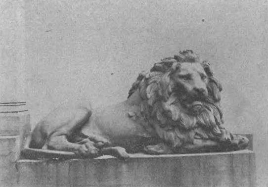 Wachender Löwe auf dem Hüttengelände in Gleiwitz